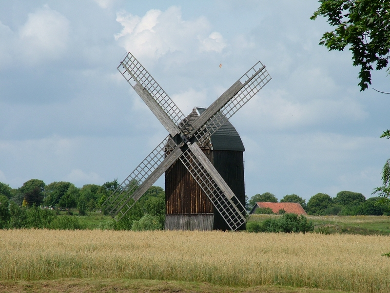 Olsztynek MBL - wiatrak koźlak z Wodzian, 1773